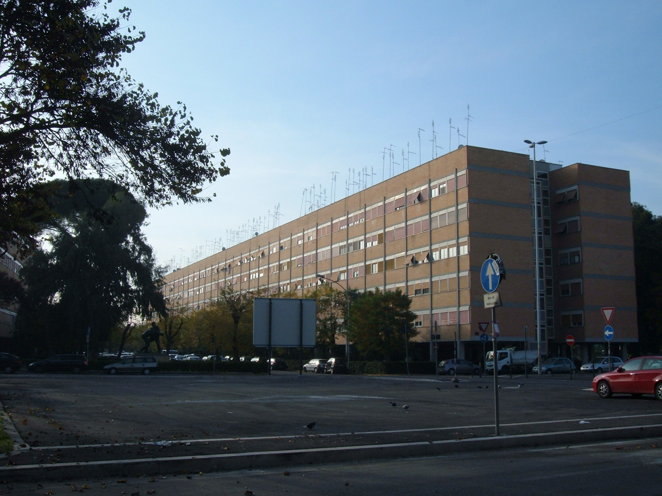 Palazzi al Villagio Olimpico (quartiere Parioli), a Roma.